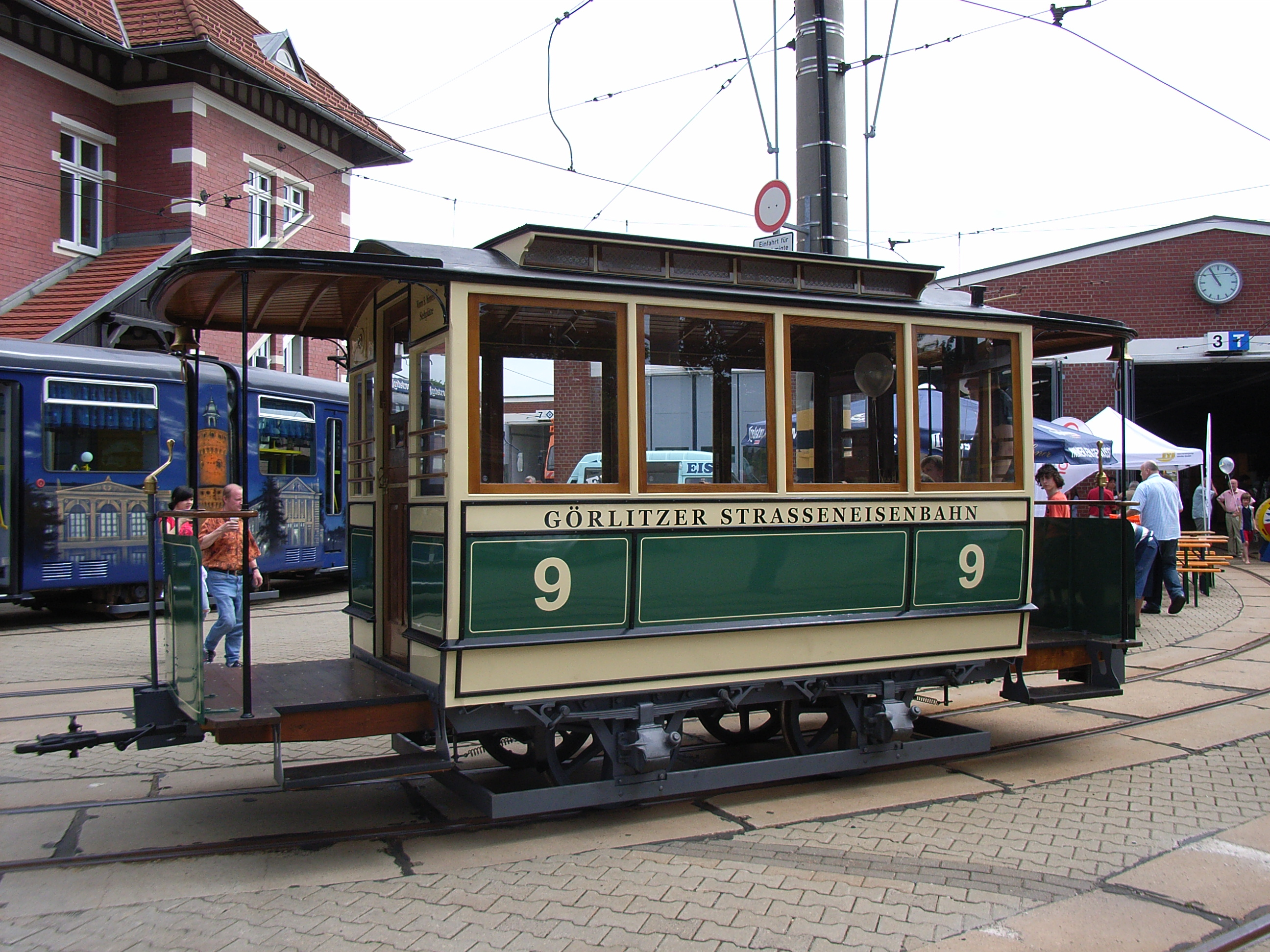 Wagen der ehemaligen Pferdestraßenbahn in Görlitz